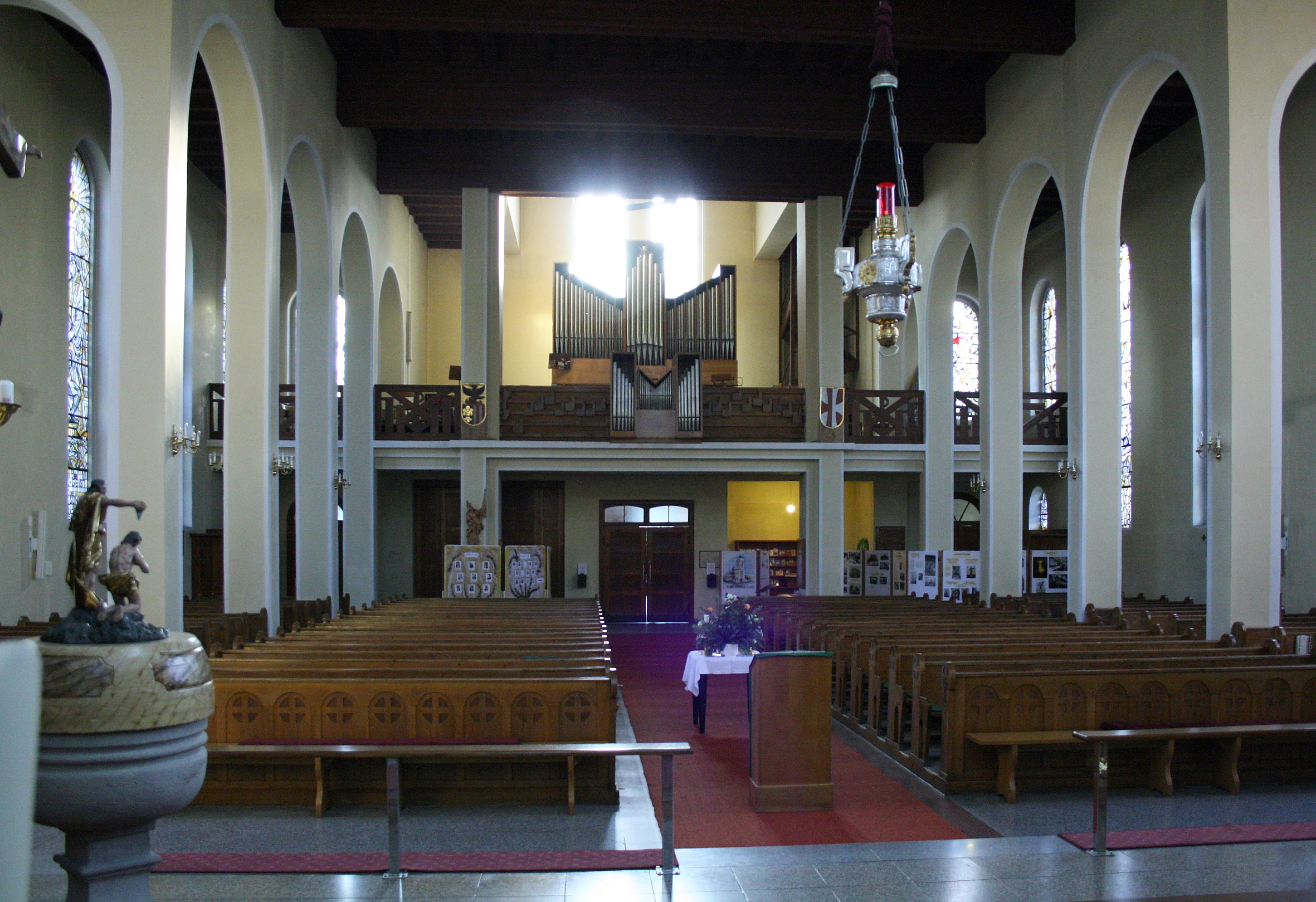 Innenansicht Richtung Empore der Pfarrkirche Hl. Geist in der oberösterreichischen Stadt Attnang-Puchheim.